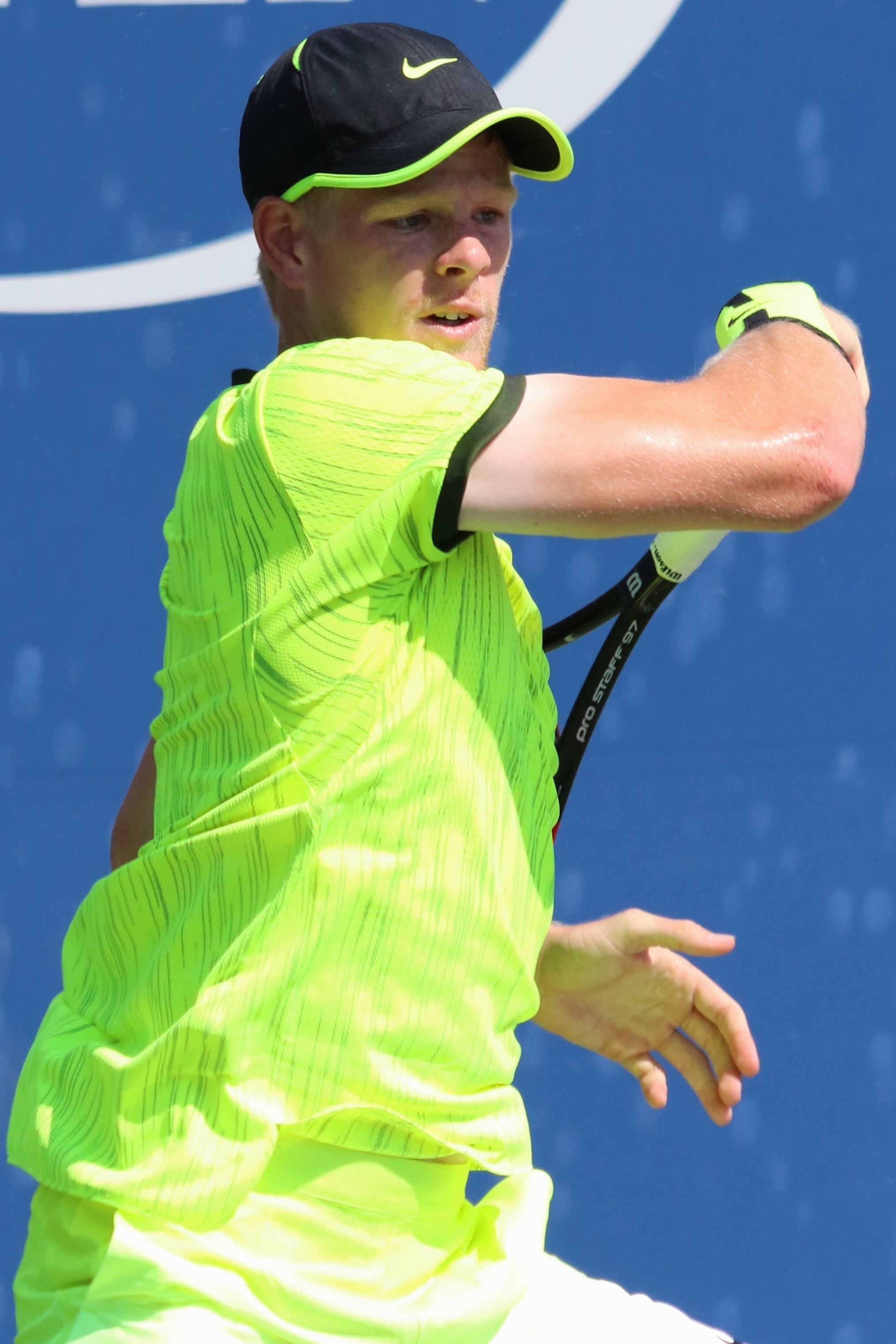 Edmund US16 (30)